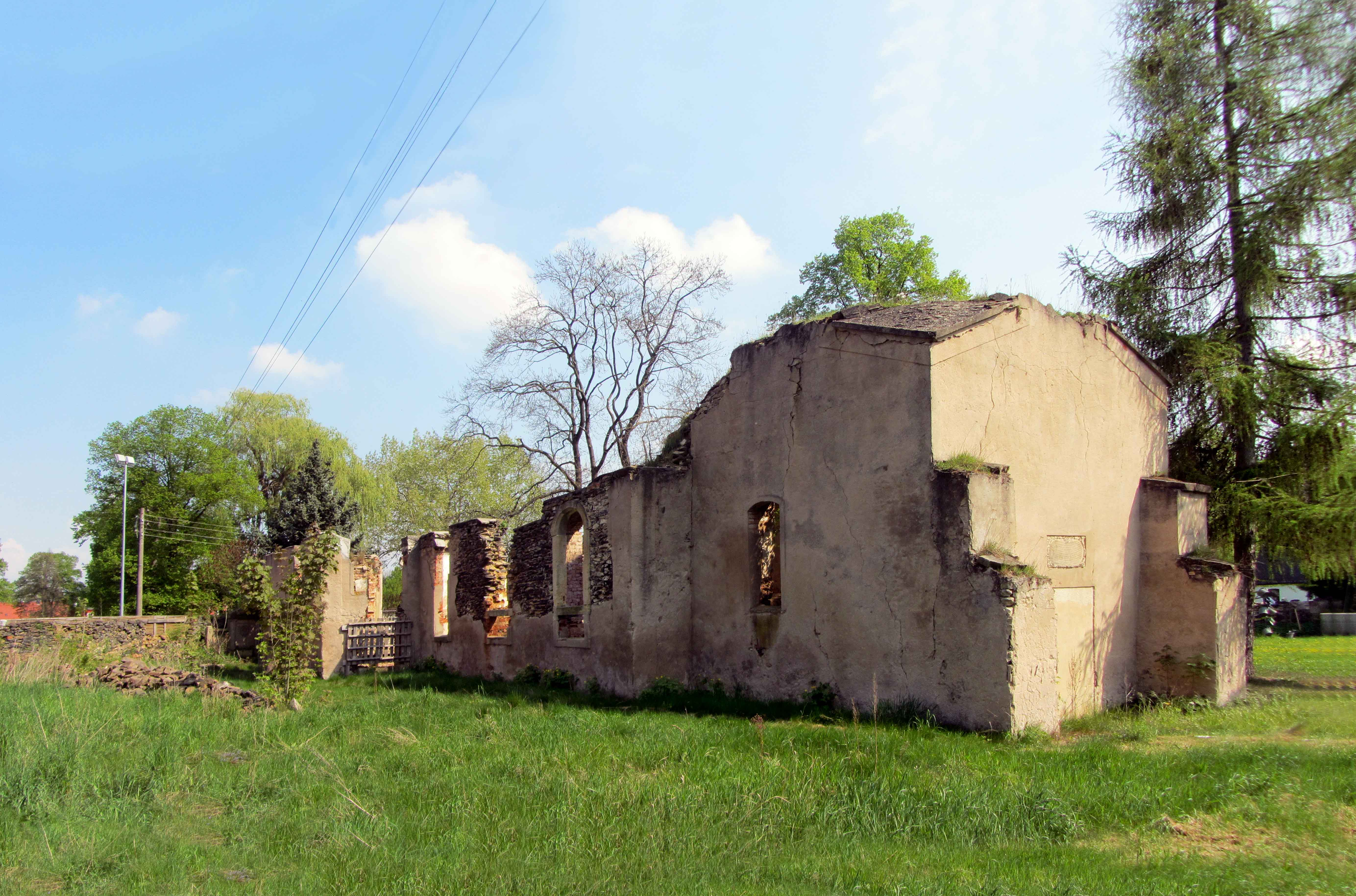 Rest der Kirche, Schäfereistraße 2 in Riesa Stt. Canitz